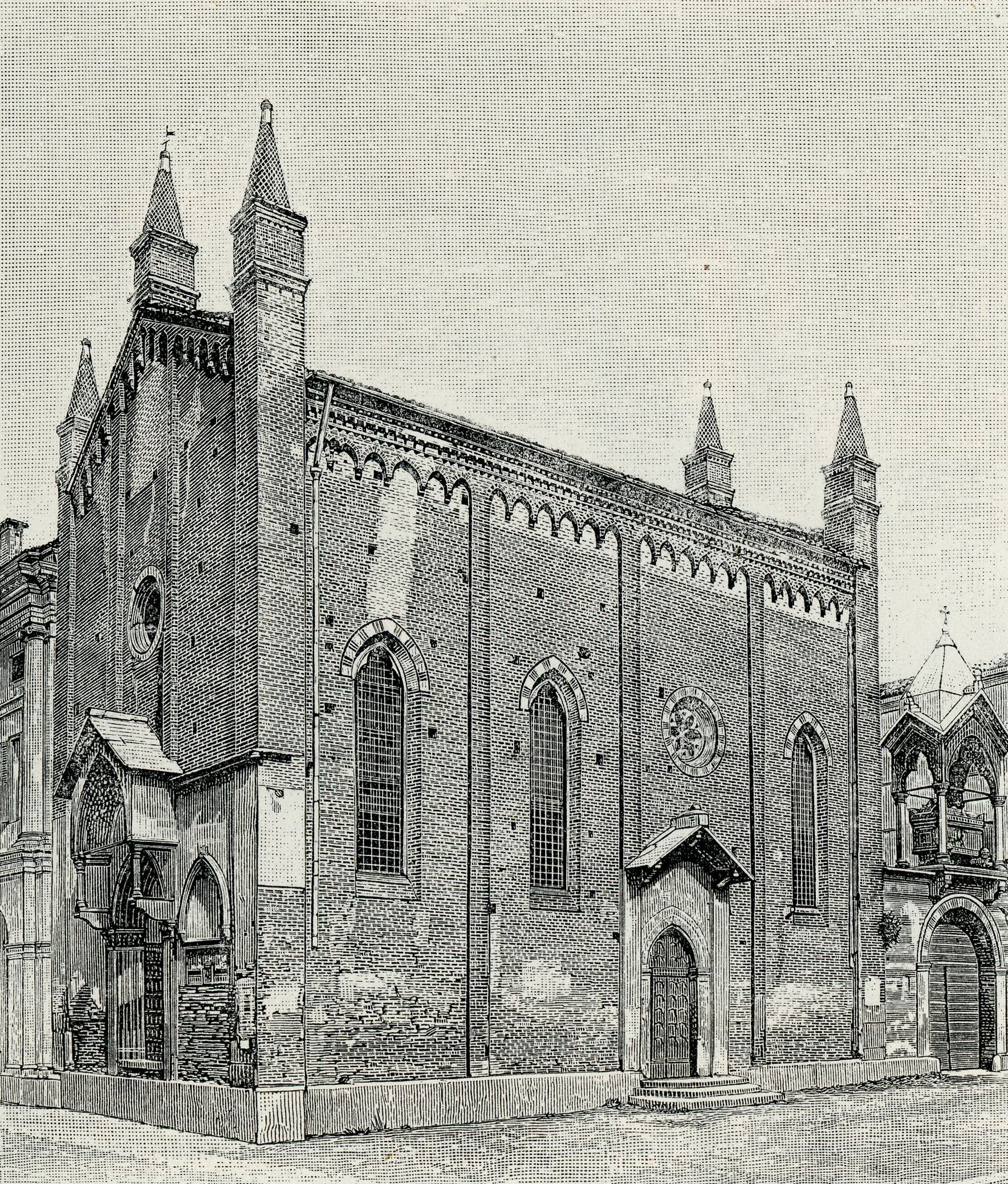 Verona: chiesa di San Pietro Martire (xilografia).